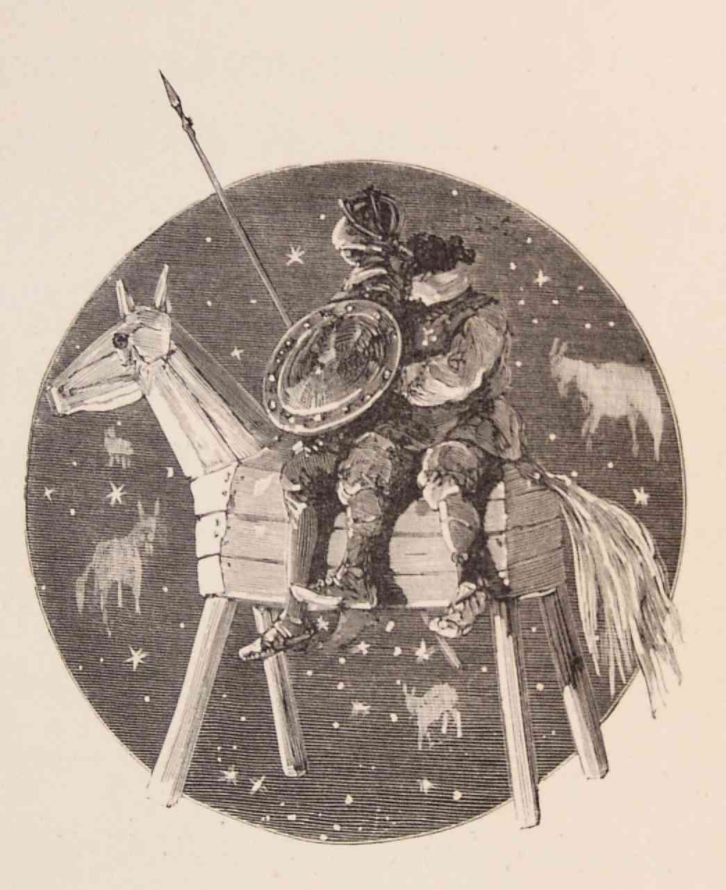 202_225_quijote_cap41